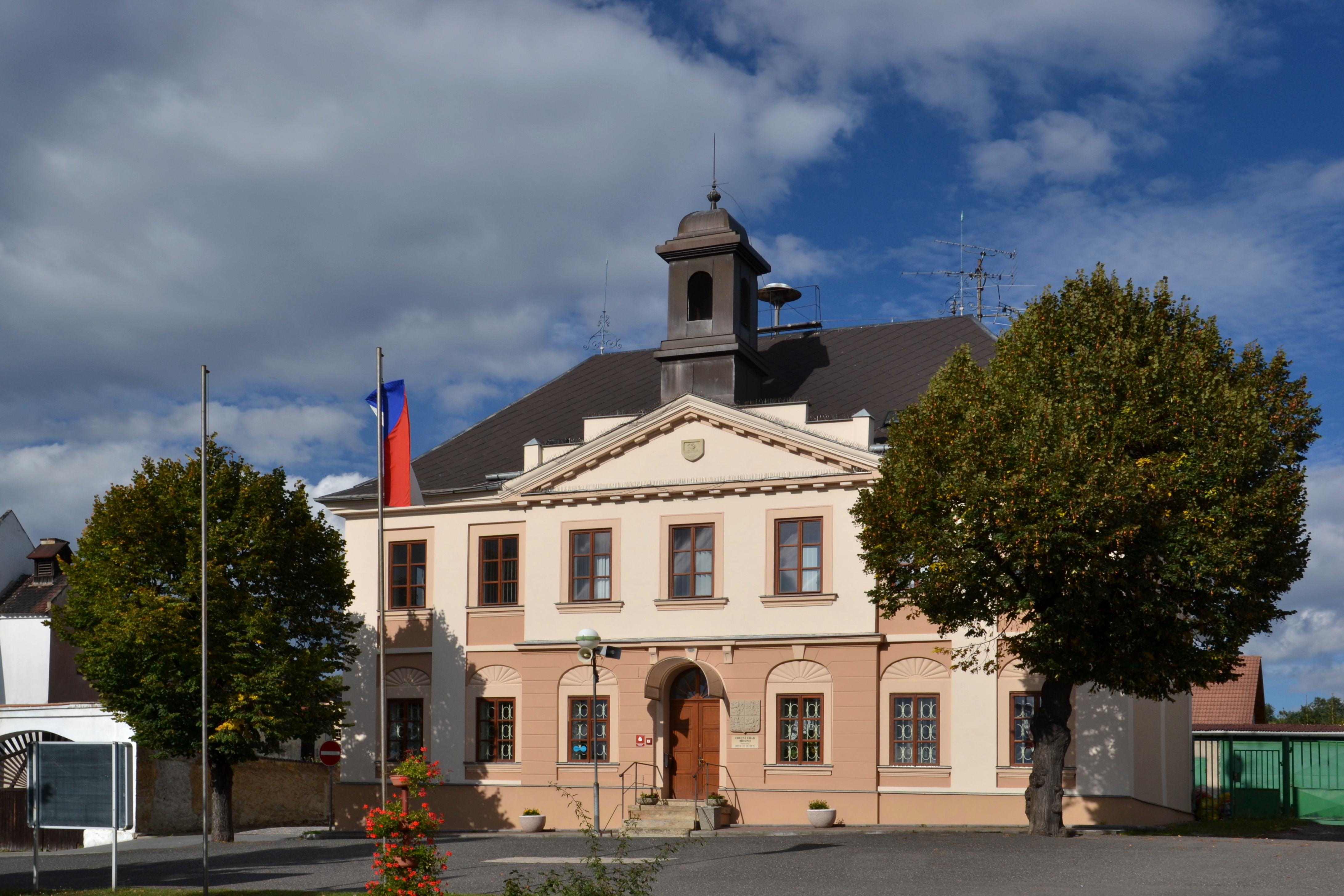 Radnice (Březno), Radniční 97, Březno